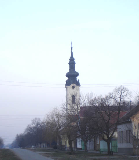 Evangelical Church in Aradac, Vojvodina, Serbia